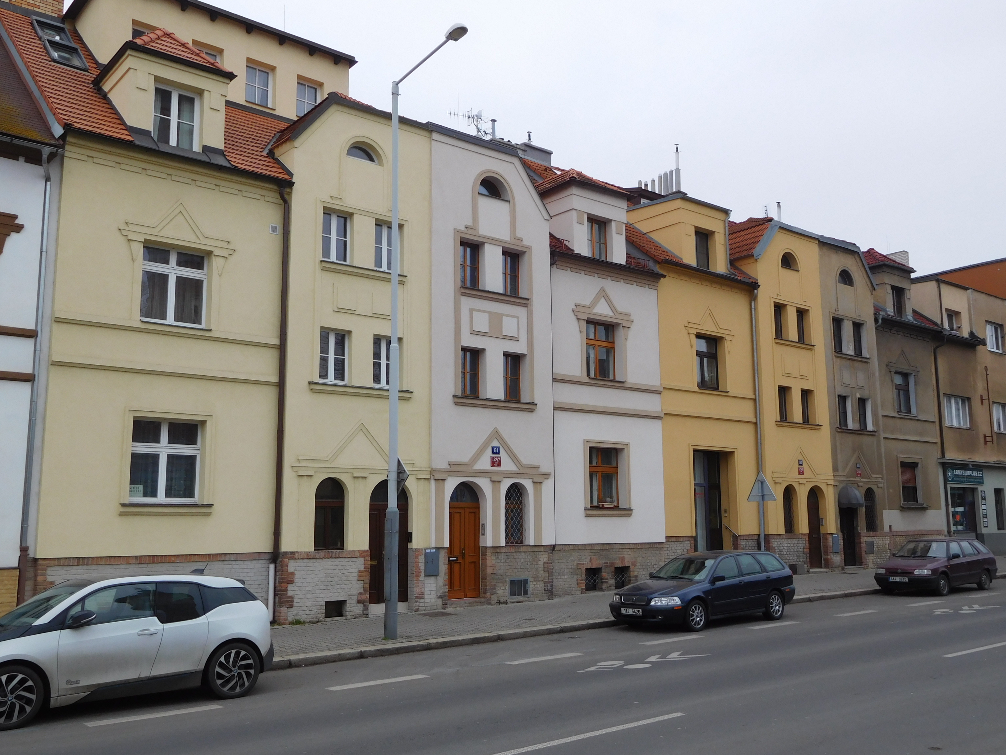 Praha - Libeň - Davídkova 79-85